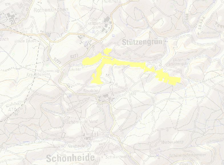 In den Gemeinden Schönheide im Erzgebirge und Stützengrün liegt das Natura 2000-Schutzgebiet „Bergwiesen um Schönheide und Stützengrün“ von 134 Hektar. Die beiden Teile liegen getrennt voneinander jeweils südlich der bebauten Teile der Gemeinden. Der größere Teil dieses FFH-Gebietes gehört zu Schönheide. Liste der FFH-Gebiete in Sachsen. Hier in einer Darstellung des Bundesamts für Naturschutz, FFH-Gebiet – gelbe Fläche. [1], abgerufen am 12. September 2015.